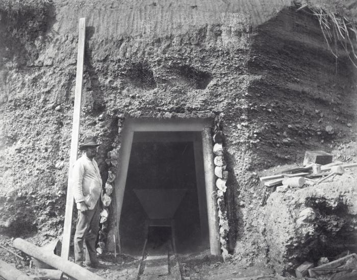 Foto. Tunnel door conglomeraat op het terrein van de goudmijn "Placer L. & F. de Jong"